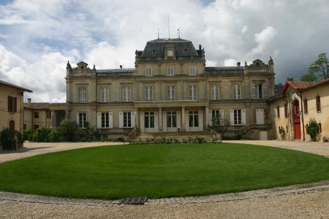 Chateau Giscours, Margaux, Bordeaux, France